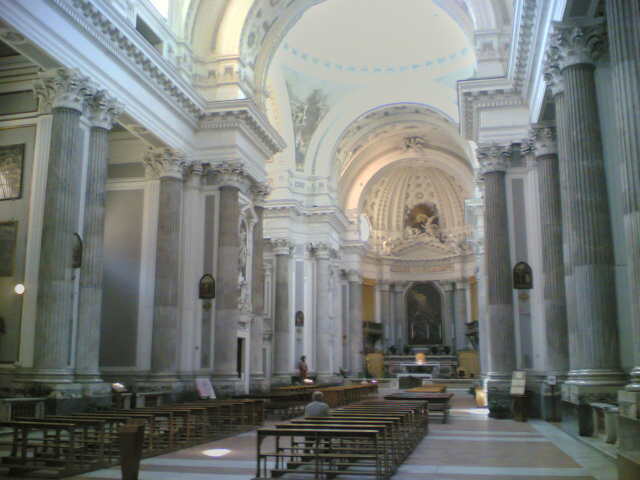 Scorcio interno, Santissima Annunziata Maggiore, Napoli